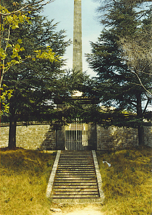 France, Aude (11), Seuil de Naurouze, Obélisque de Riquet